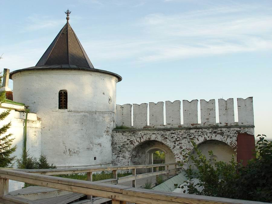 Pavlinskaja belfrido de Tobolskij kremlo. Konstruis en fino de XVII jarcento.